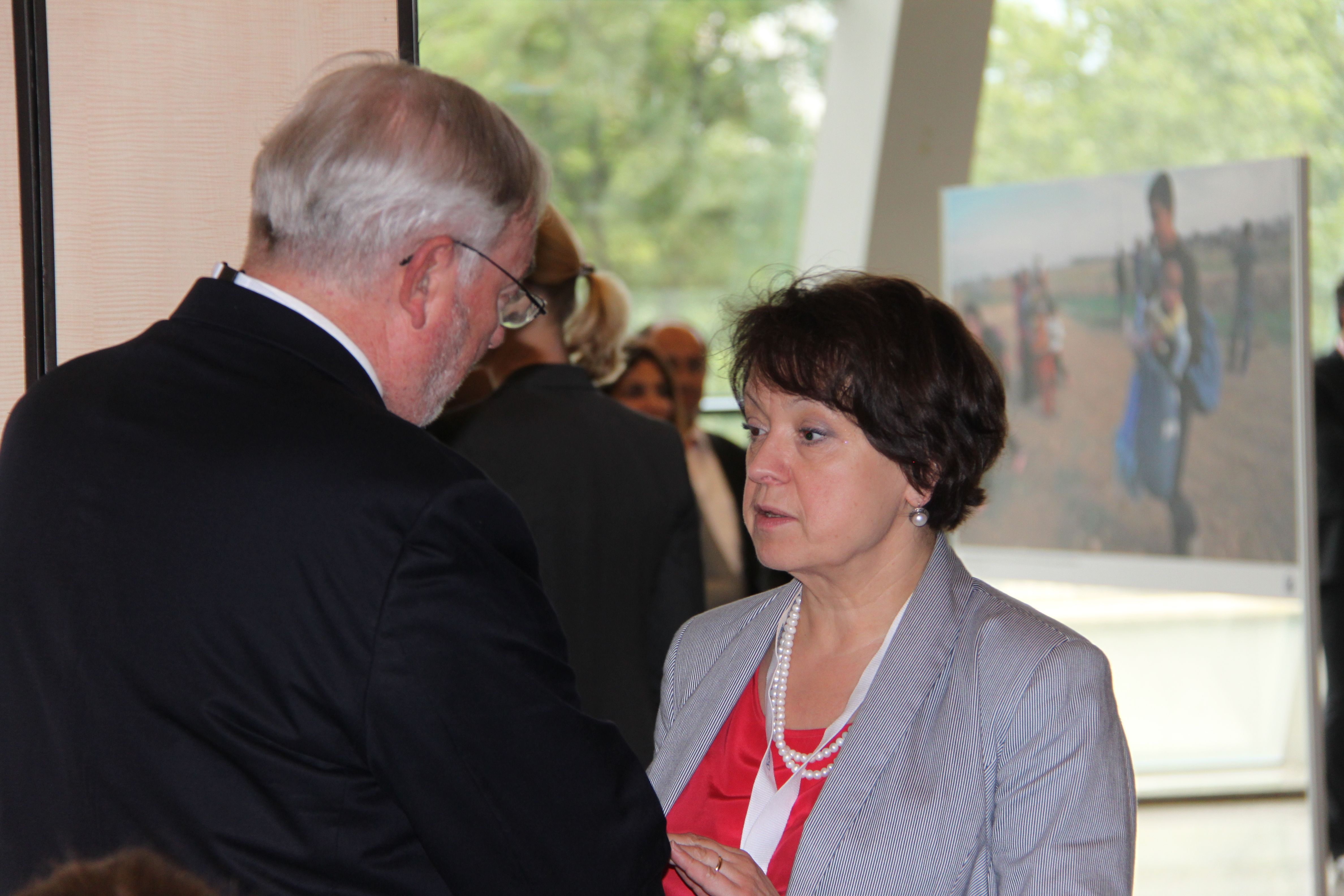 Vilija Aleknaitė-Abramikienė(Lithuania) speaks with Sec Gen Spencer Oliver